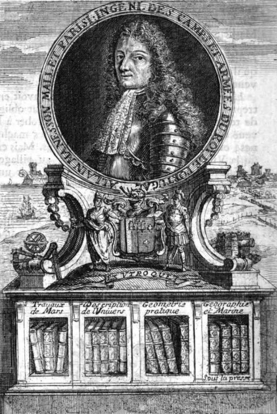 Autoportrait de l'auteur et représentation de ses publications.